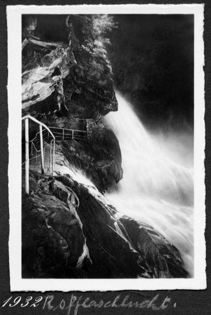 Rofflaschlucht, Via Mala, Andeer, Graubünden, Switzerland